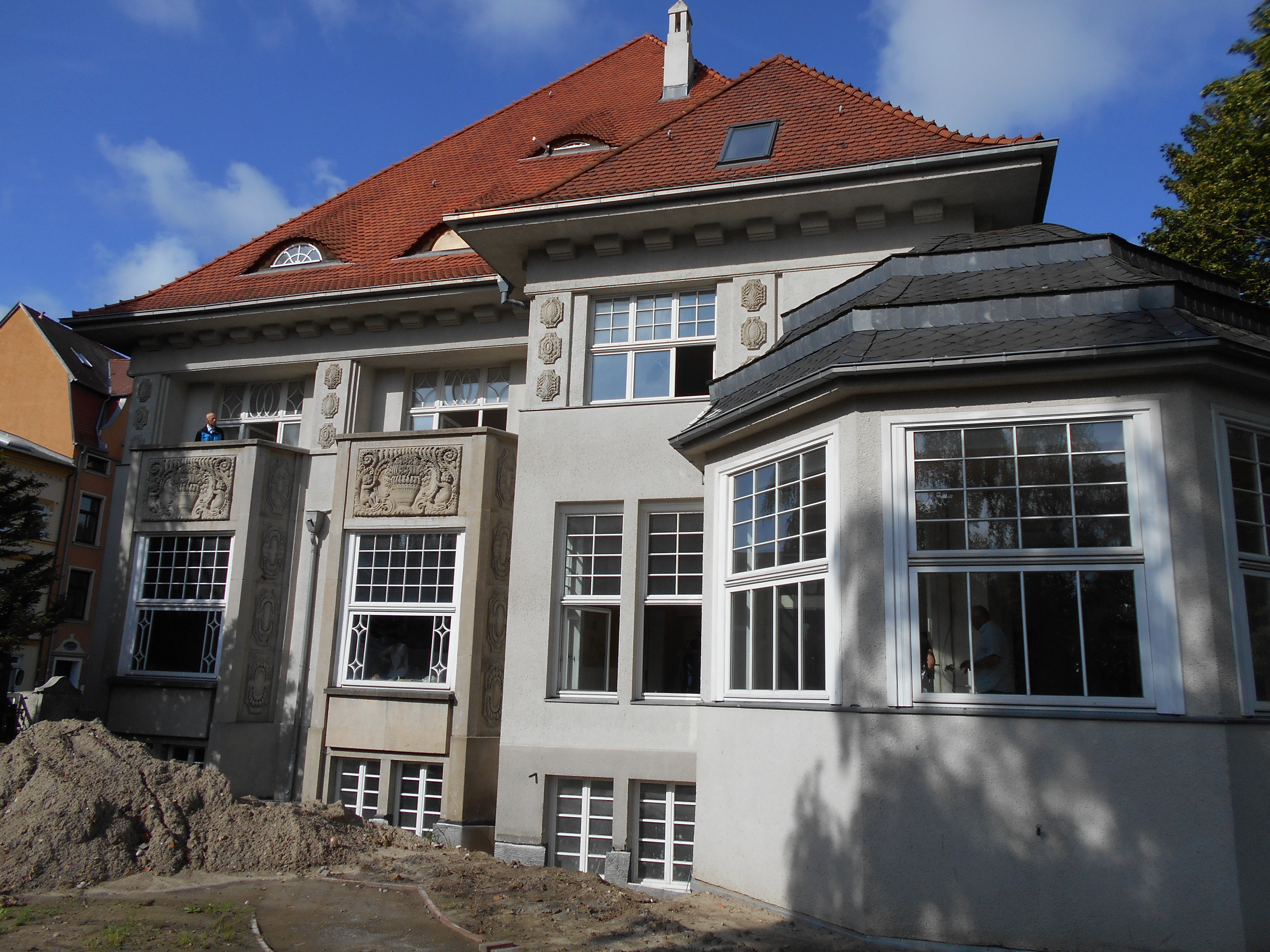 Zeecksche Villa in Rostock Gartenseite (Ostseite)